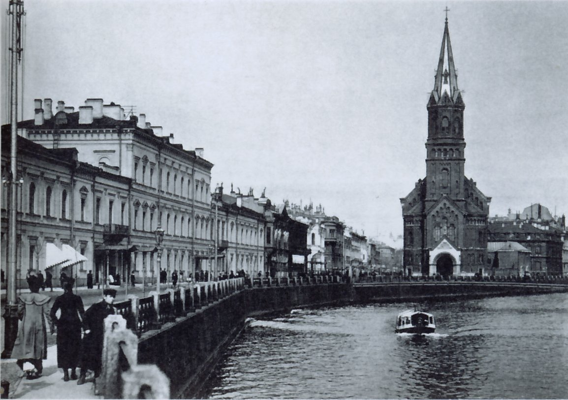 Набережная Мойки у Реформаторской церкви, Большая Морская